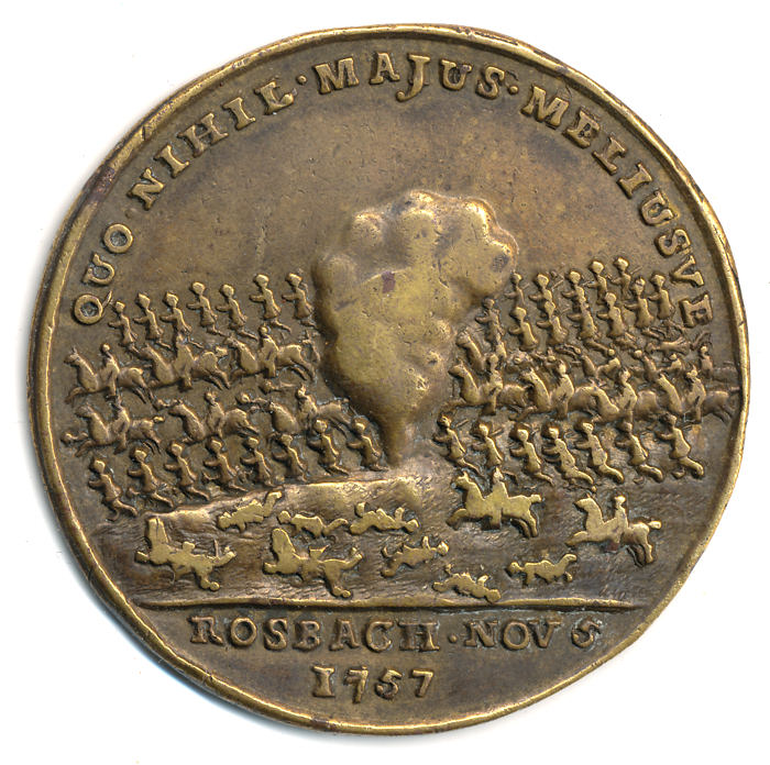 Médaille commémorant la Bataille de Rossbach, 1757, bronze, 48 mm, revers